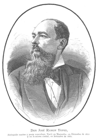 Retrato de José Ramón Yepes, recogido en la revista española La Ilustración Española y Americana.